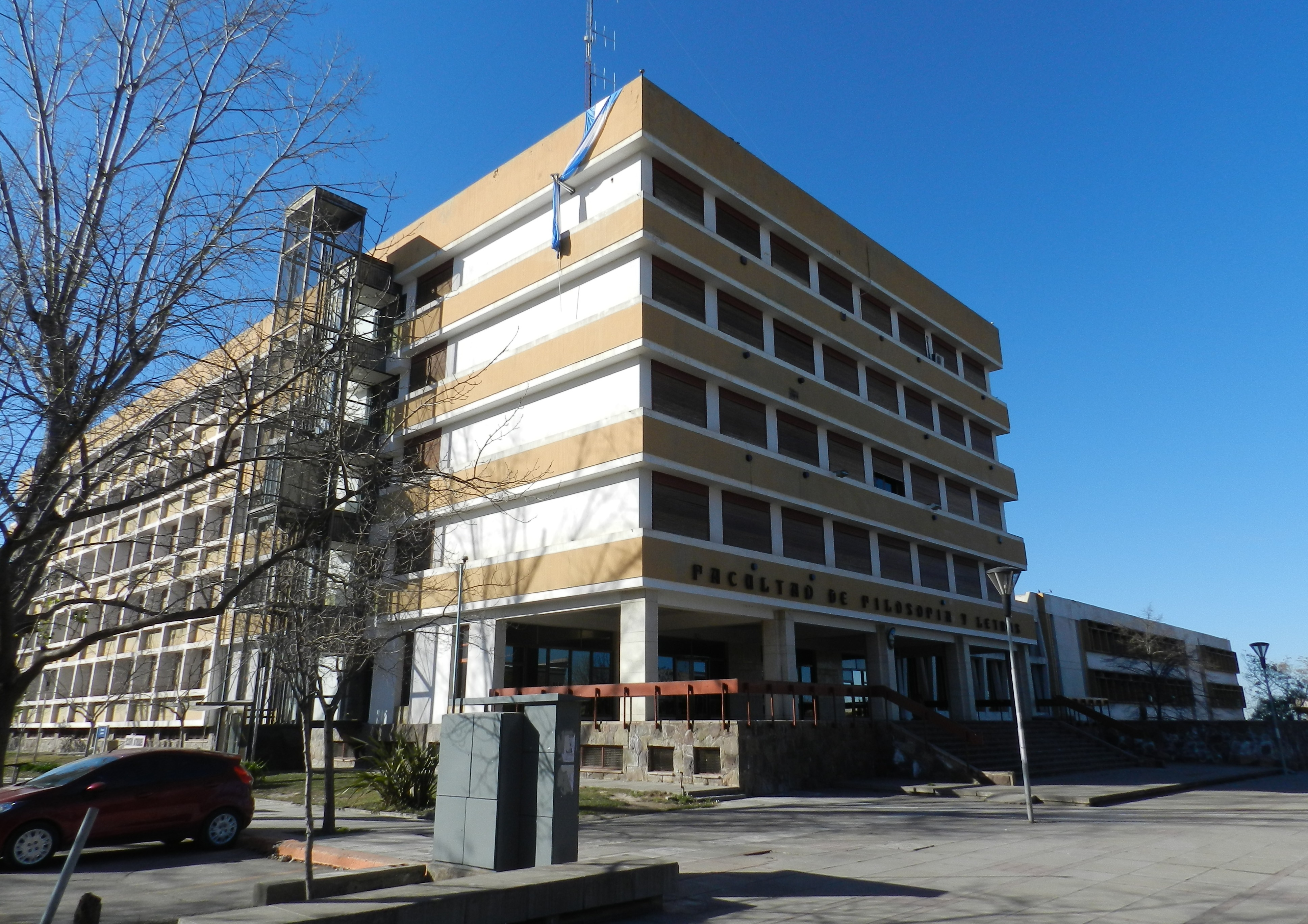 Filosofía y Letras UNCuyo